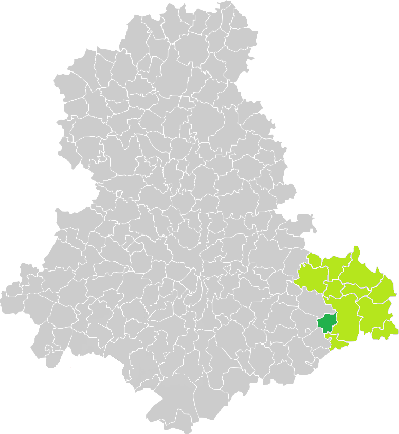 Carte de situation de la commune de Sainte-Anne-Saint-Priest (en vert foncé) dans le votre Canton (en vert clair) sur une carte des communes de la Haute-Vienne